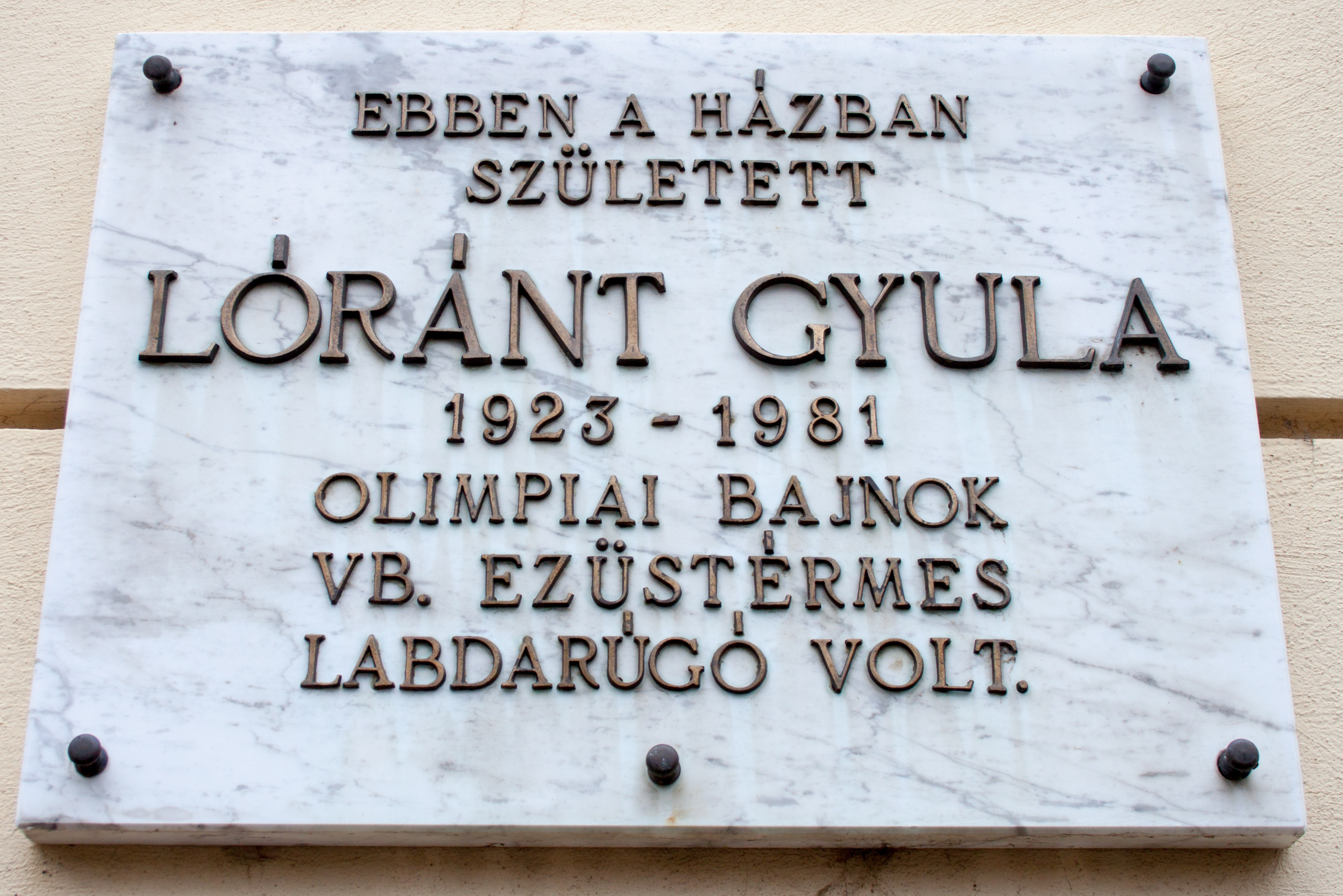 Plaque of Gyula Lóránt, Kőszeglabel QS:Len,"Plaque of Gyula Lóránt, Kőszeg" label QS:Lhu,"Lóránt Gyula kőszegi emléktáblája"